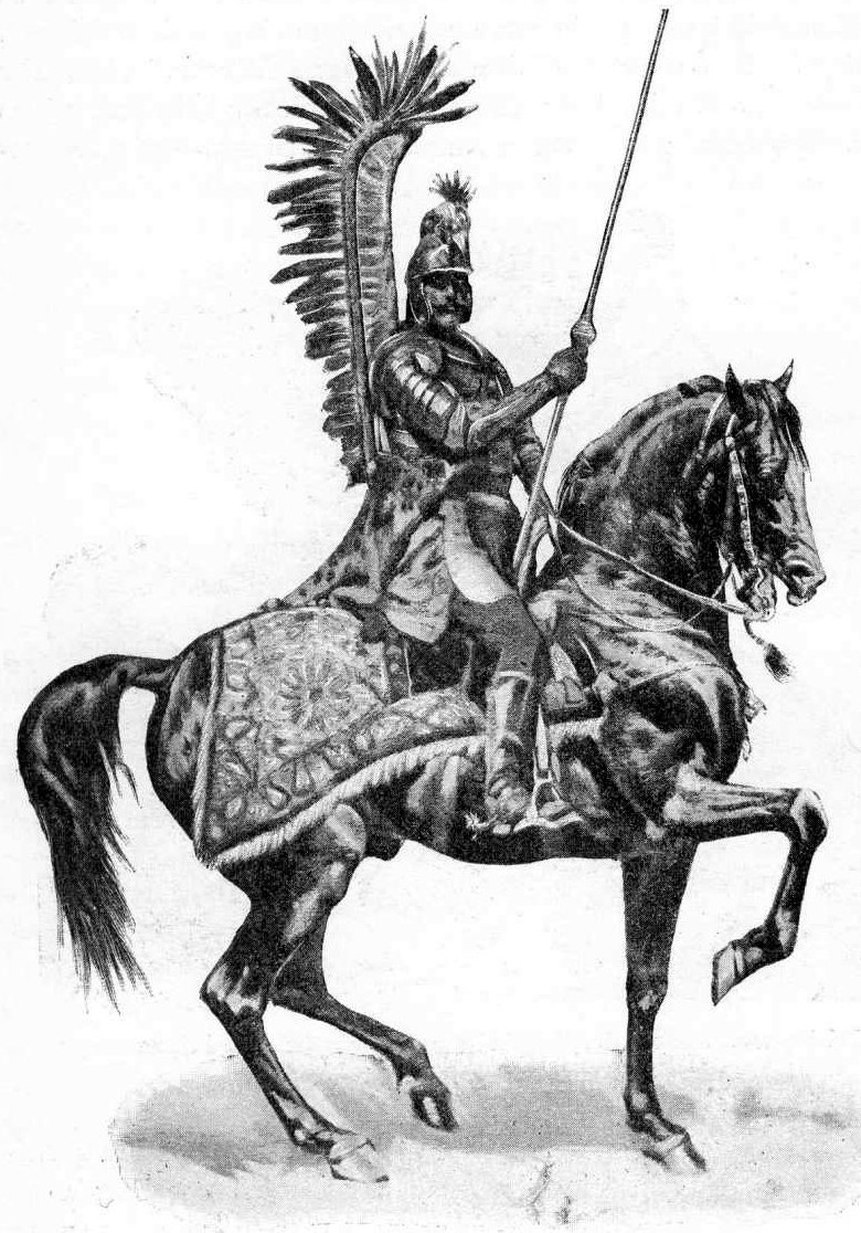 Ilustracja do Encyklopedii staropolskiej T.2 299 - husarz z obrazu A. Strzałeckiego